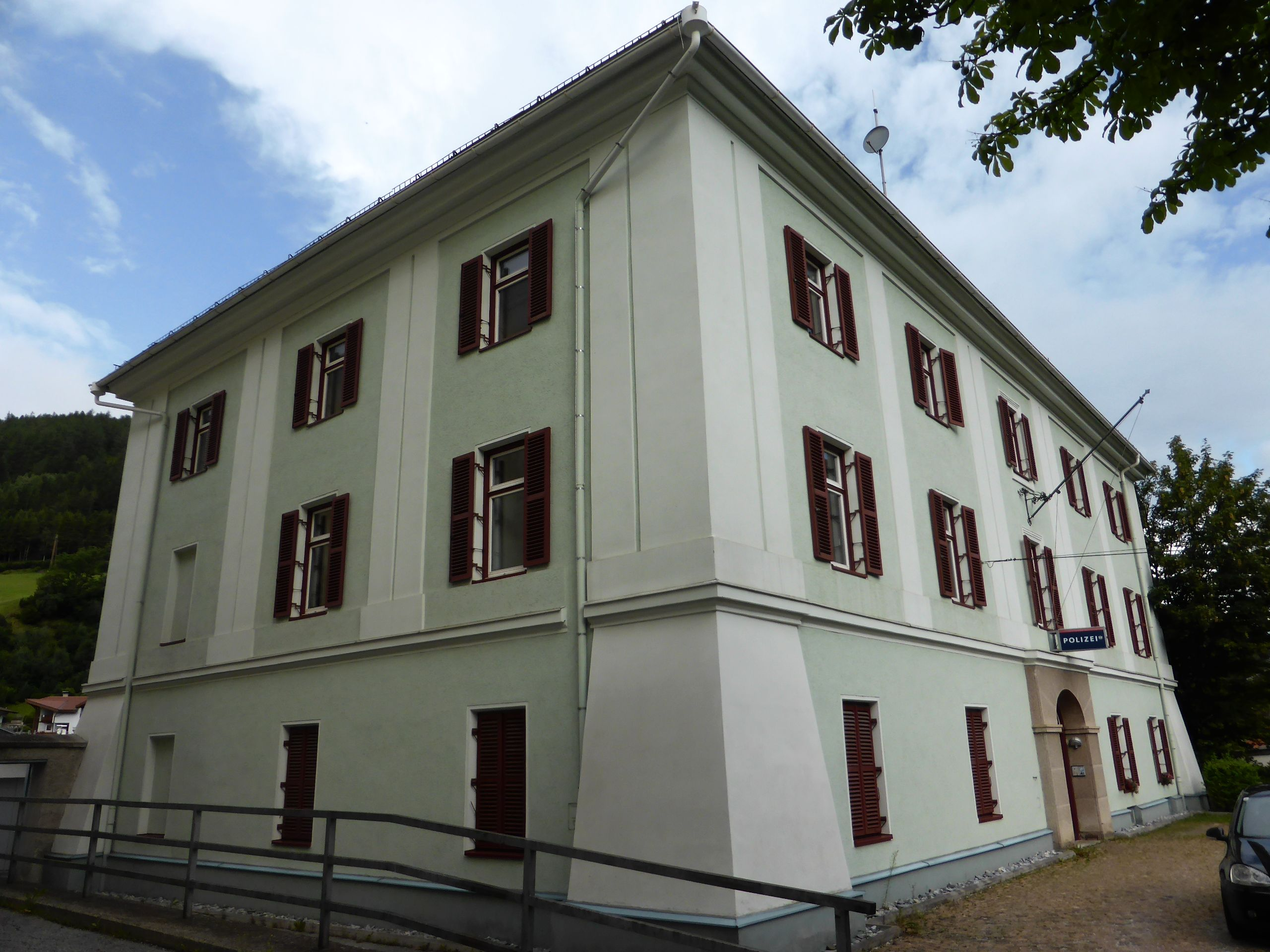 Polizeigebäude, ehem. Bezirksgericht